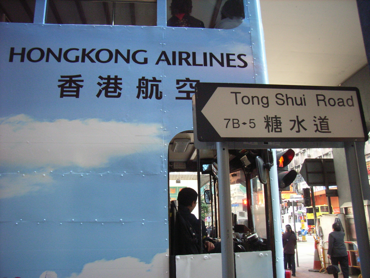 糖水道 Tong Shui Road, North Point, Hong Kong. Photographer is User:Huang Kong Hing